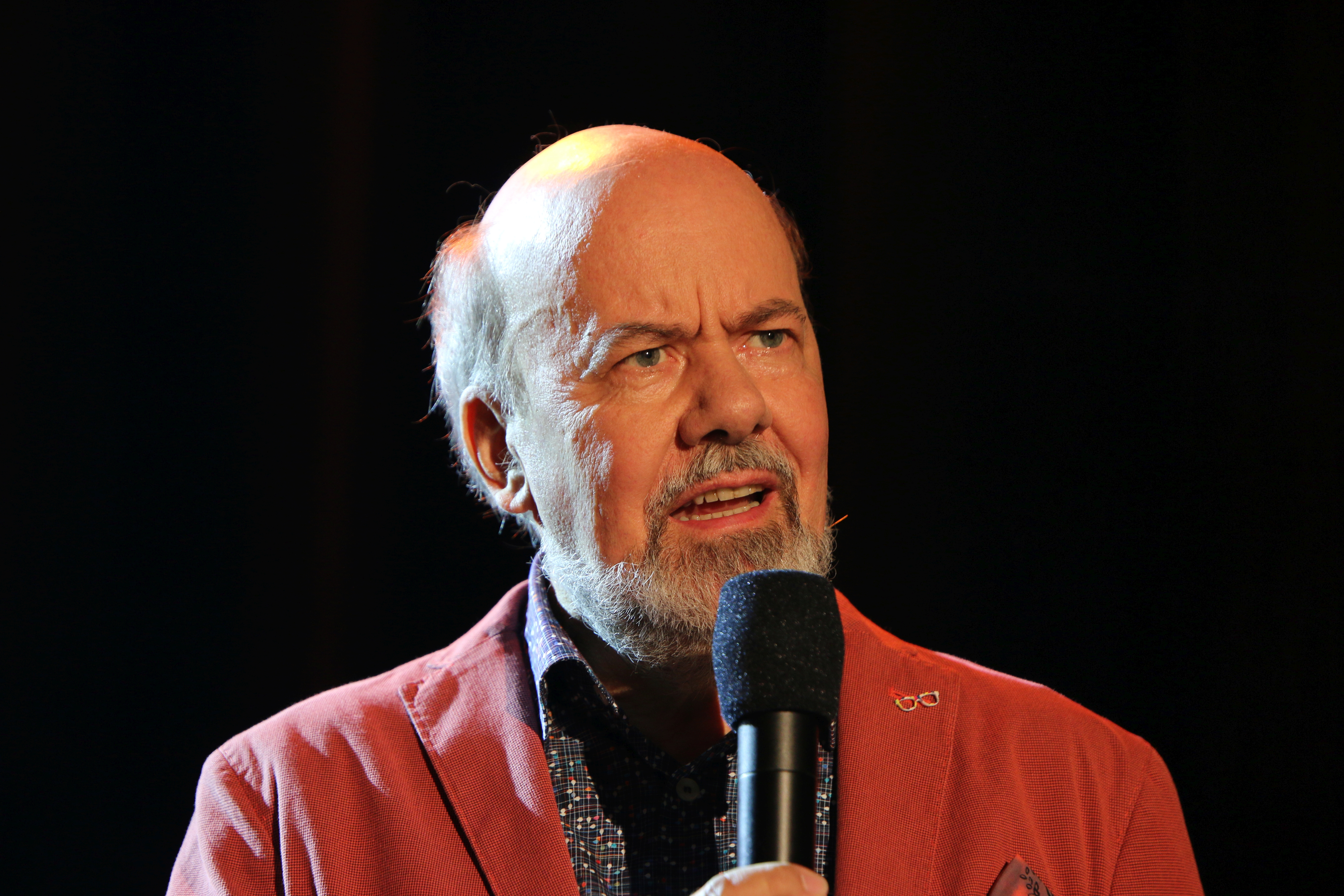 46. Deutsches Jazzfestival Frankfurt 2015: Peter Kemper